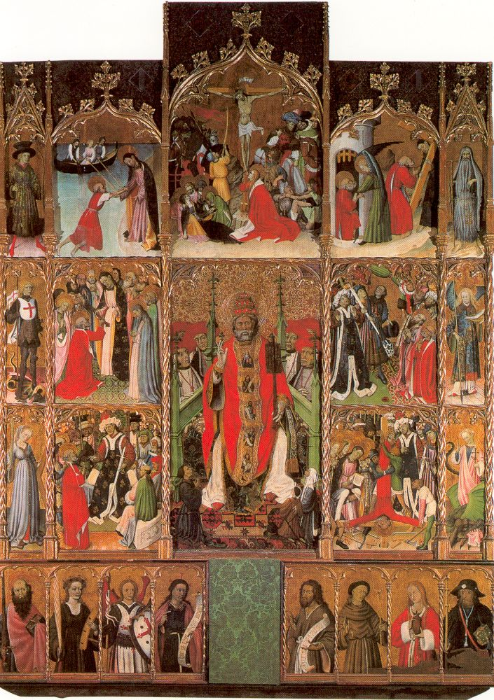 Retaule de Sant Pere de l'església de Púbol, Girona. Museu d'Art de Girona. Obra de Bernat Martorell.